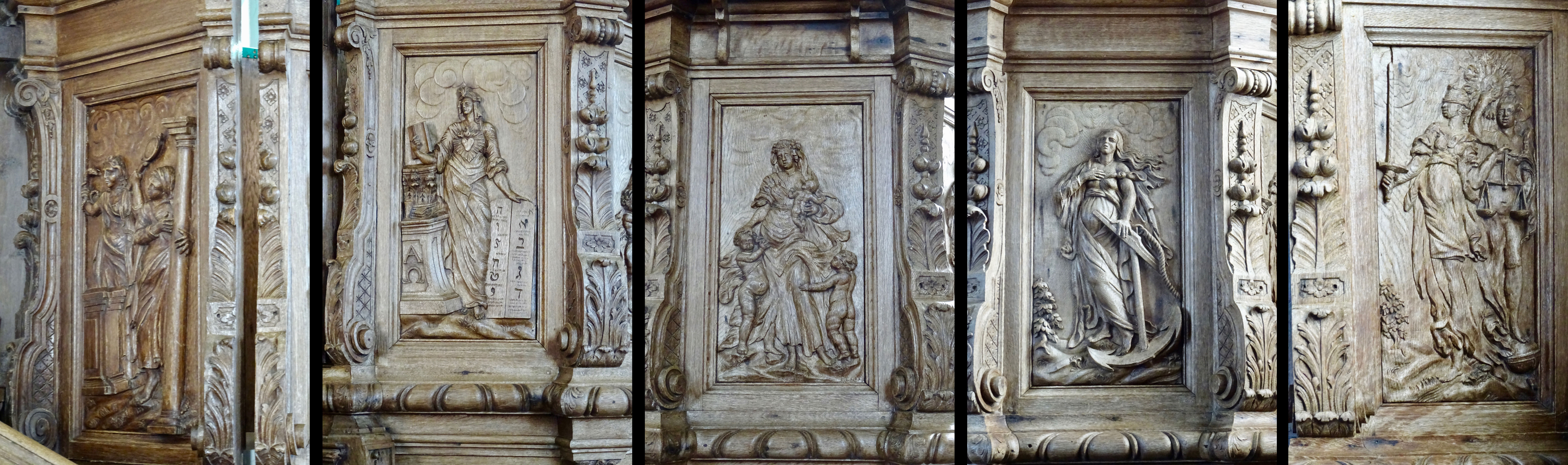 Houtsnijwerk (preekstoel) in de Mariakerk in Bears